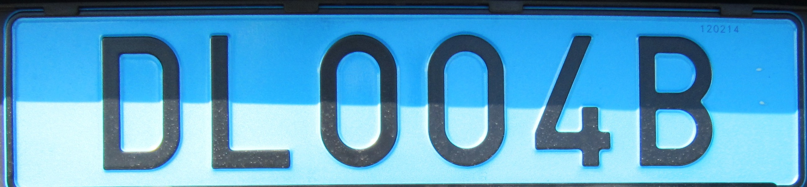 Zweden CD kenteken